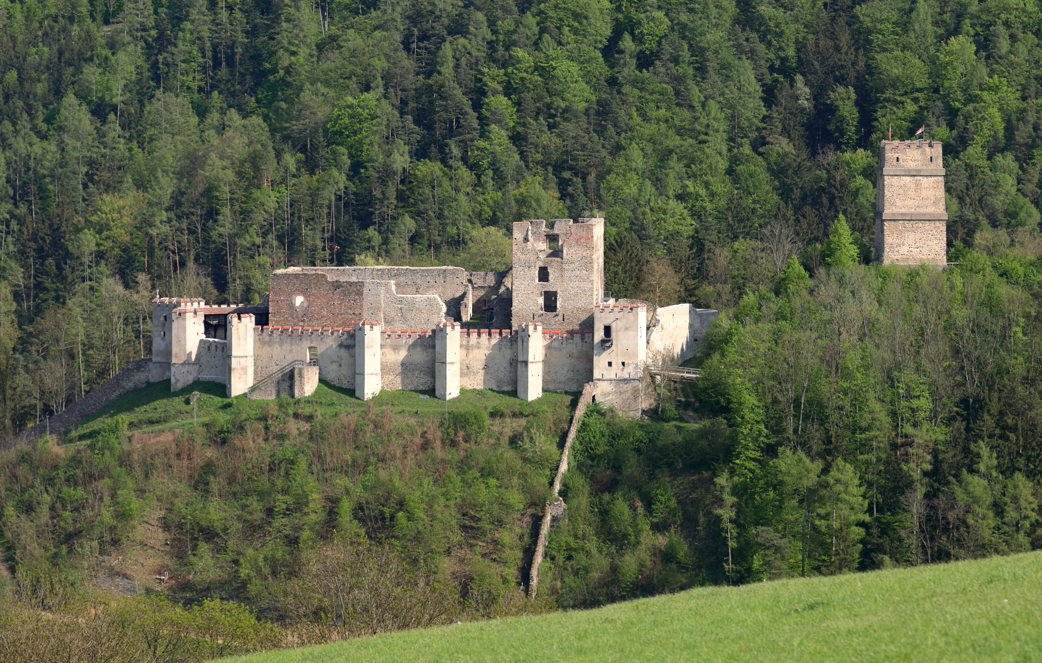 Nordwestansicht der Burgruine in der niederösterreichischen Stadt Kirchschlag in der Buckligen Welt. Rechts der durch einen Halsgraben von der übrigen Burganlage getrennte Bergfried und der heutzutage als Aussichtsturm genutzt wird.